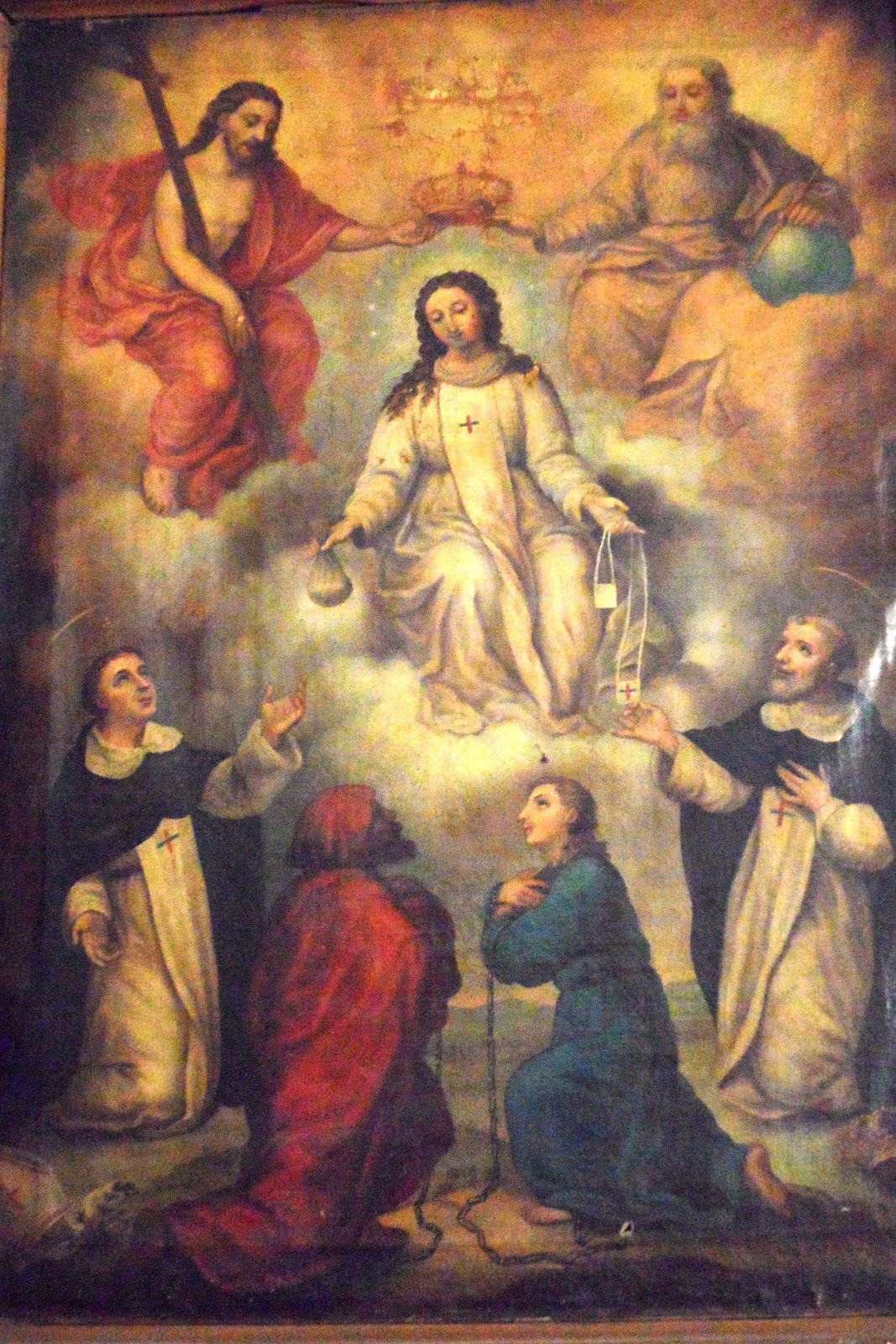 São João de Matha e São Félix de Valois assistidos por Nossa Senhora do Bom Remédio e pela Santíssima Trindade.